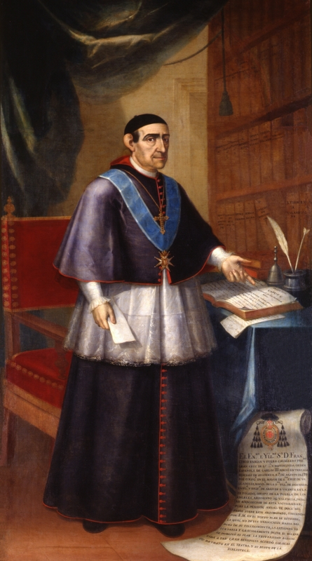 Francisco Fabián y Fuero, óleo sobre lienzo, 201 x 114 cm, Universidad de Valencia, Paraninfo